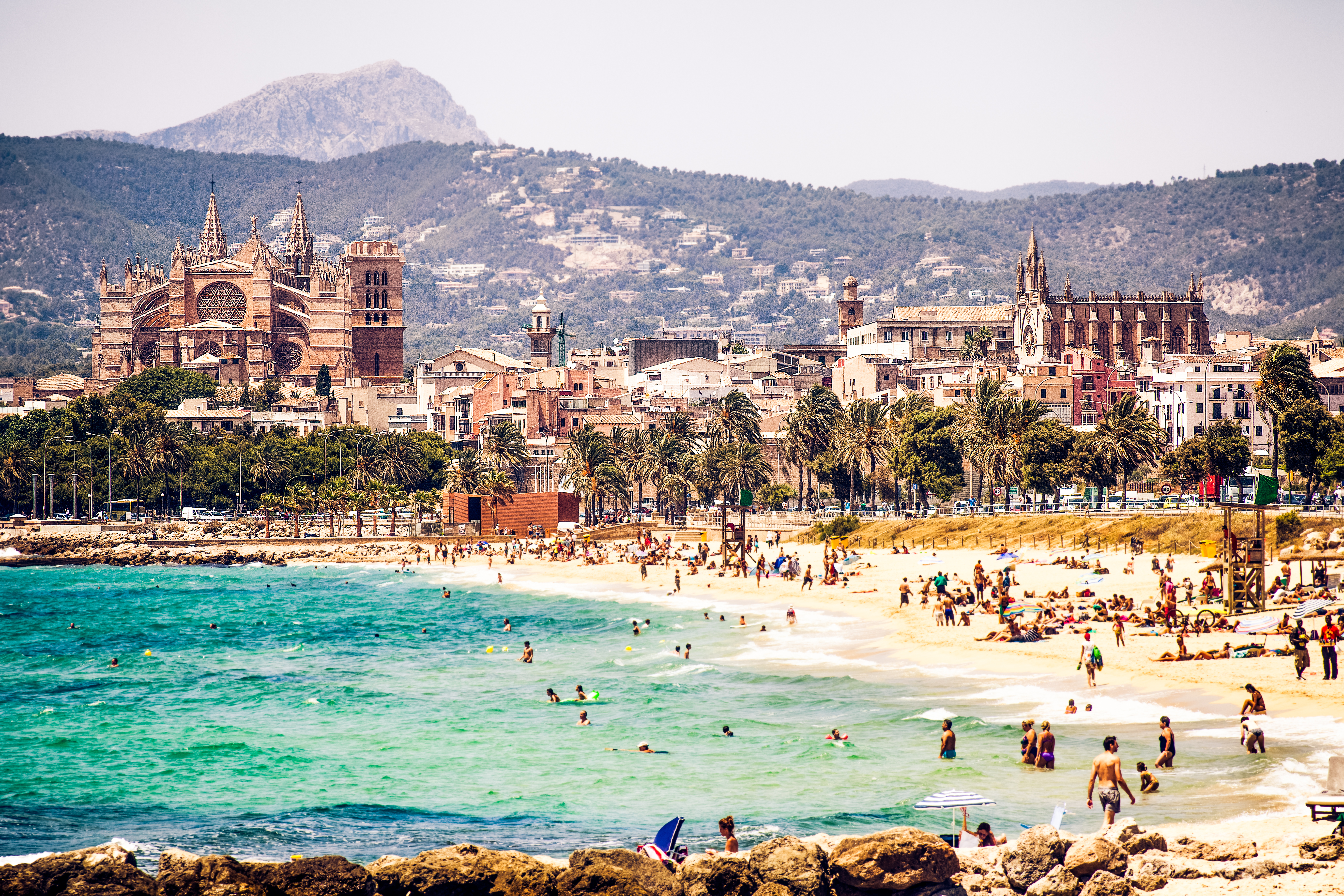 Día de playa